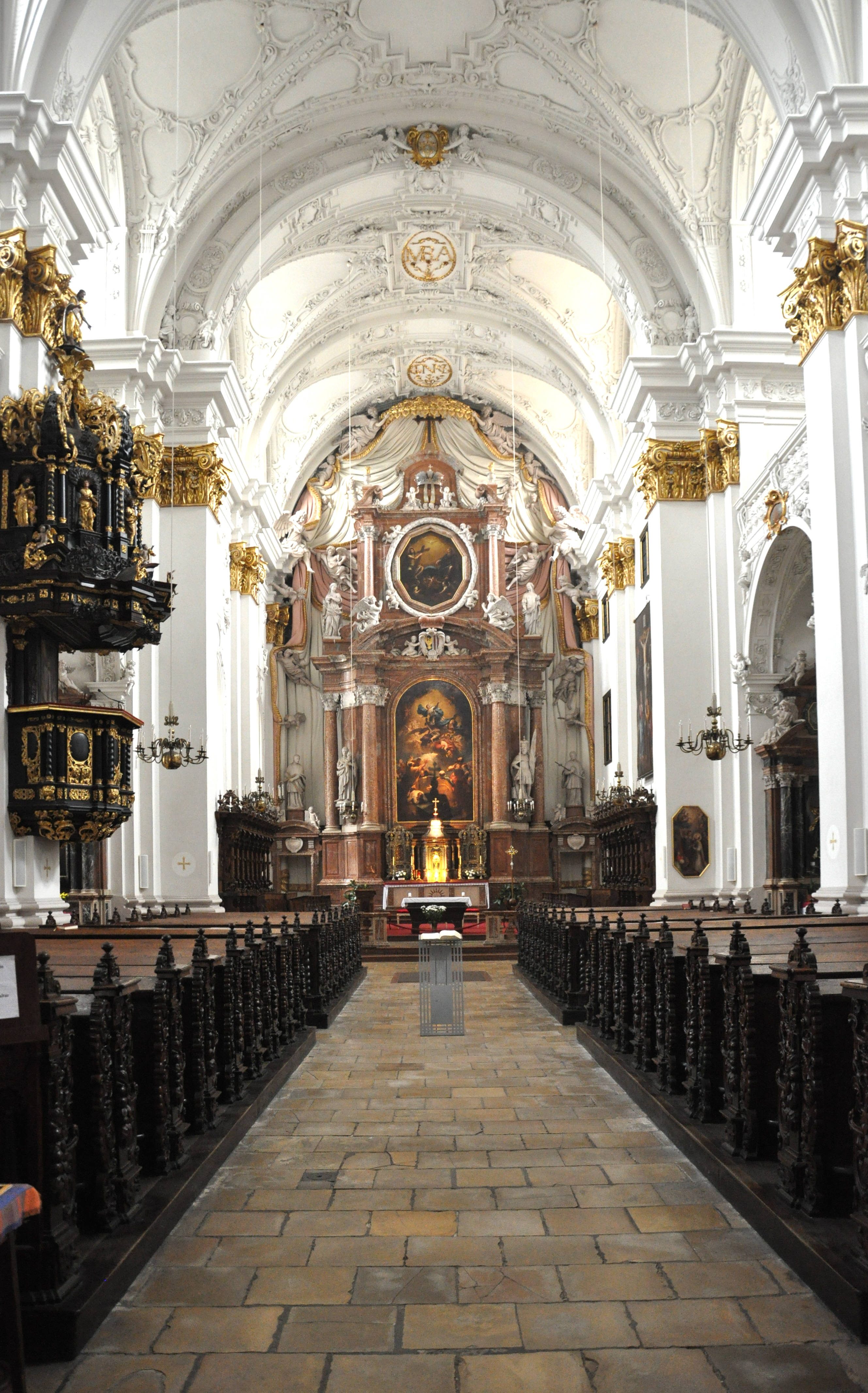 Linz, Alter Dom, Innenansicht